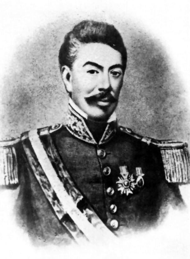 Miguel de San Román y Meza (1802 - 1863), militar y político peruano, Presidente Constitucional de la República del Perú de 1862 a 1863.